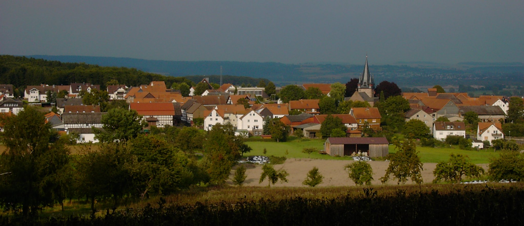 Marburg-Bauerbach (Ansicht von Westen)